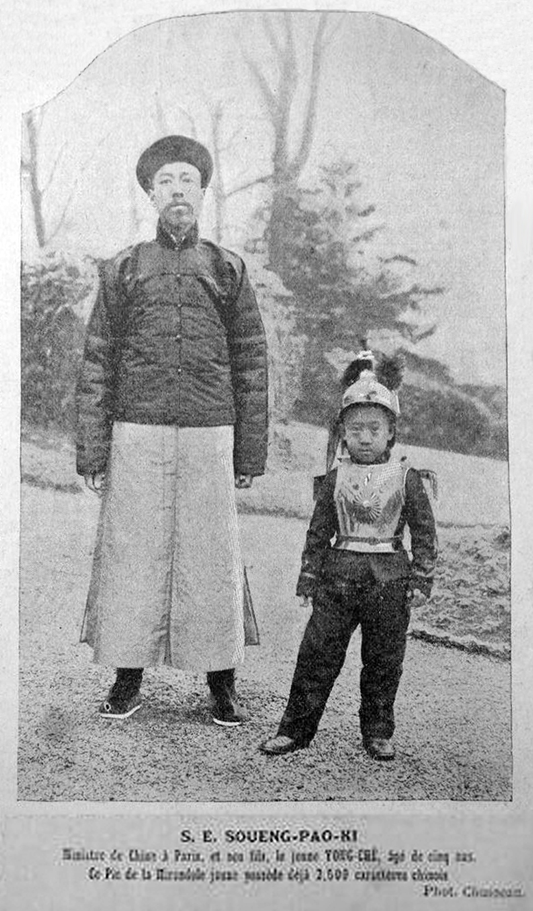 孙宝琦及儿子孙用时的合影